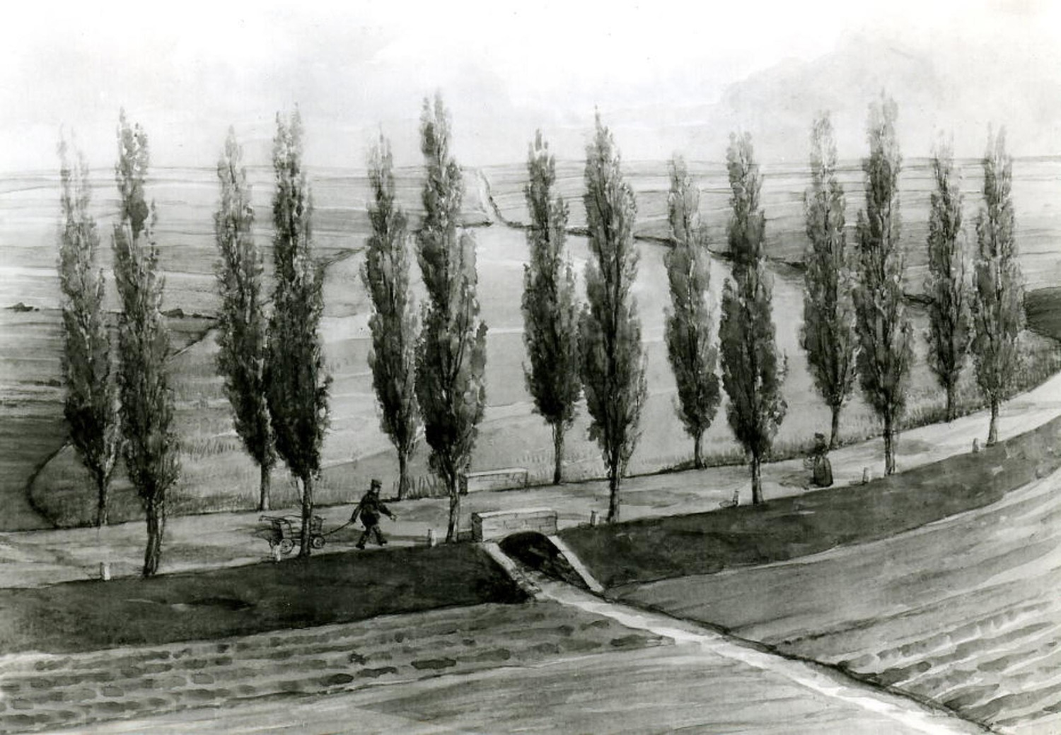 Der Pappelteich mit dem Trenkengraben an der Bornaischen Straße in Connewitz (Leipzig). Fotografische Reproduktion (1880) eines Aquarells von unbekannter Hand